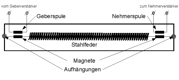 Schematische Darstellung einer Hallspirale